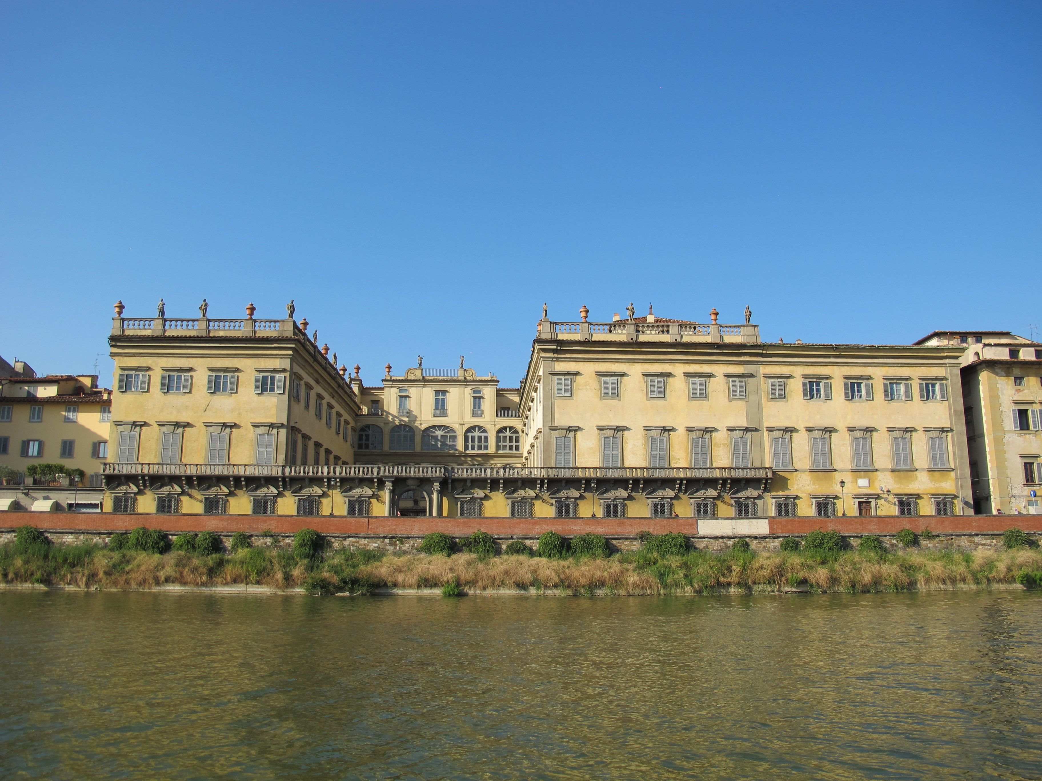 Palazzo corsini al parione visto dal fiume